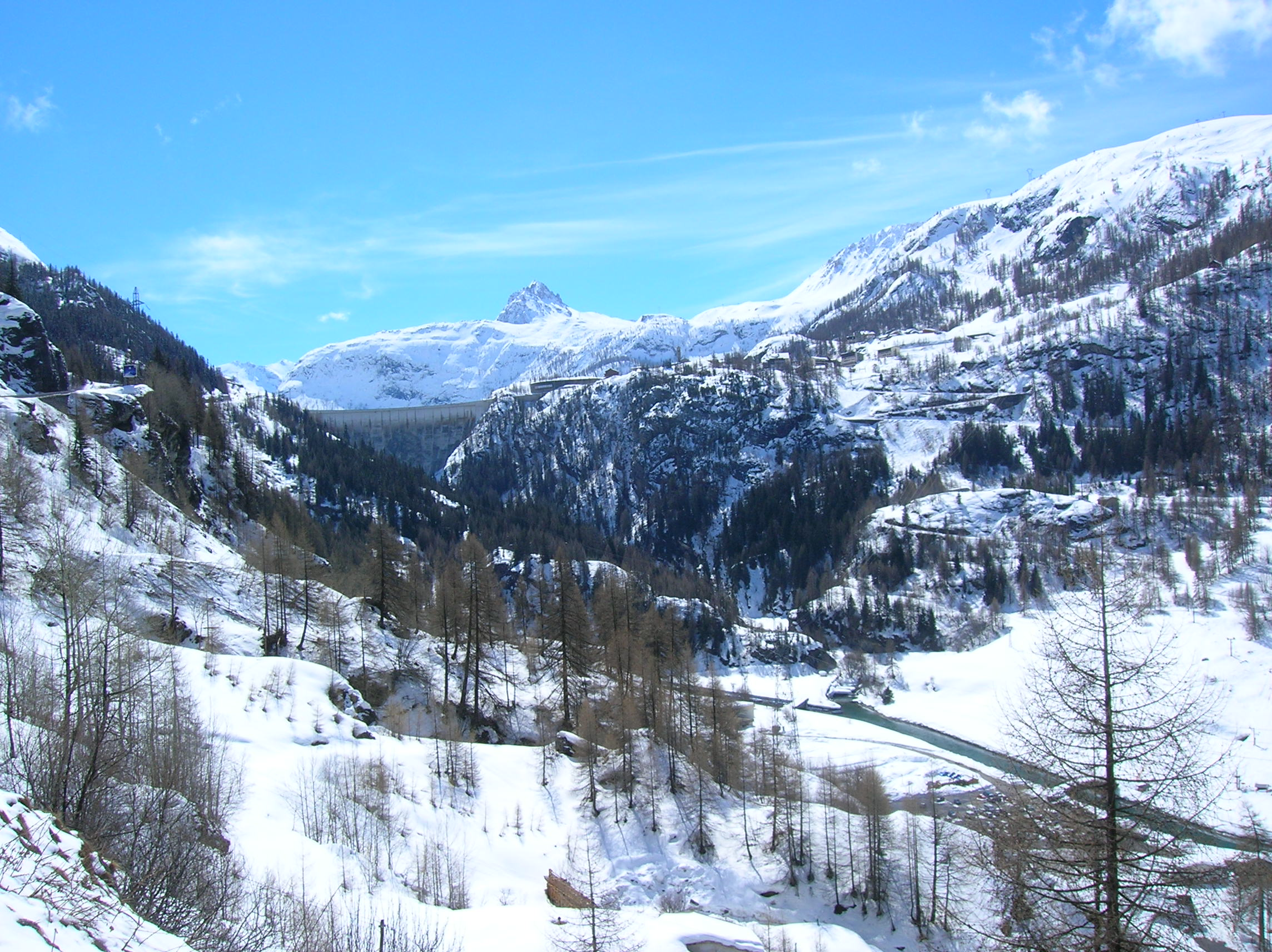 Barrage de Tignes en Savoie dans les Alpes françaisesDam of Tignes in Savoy, French Alps